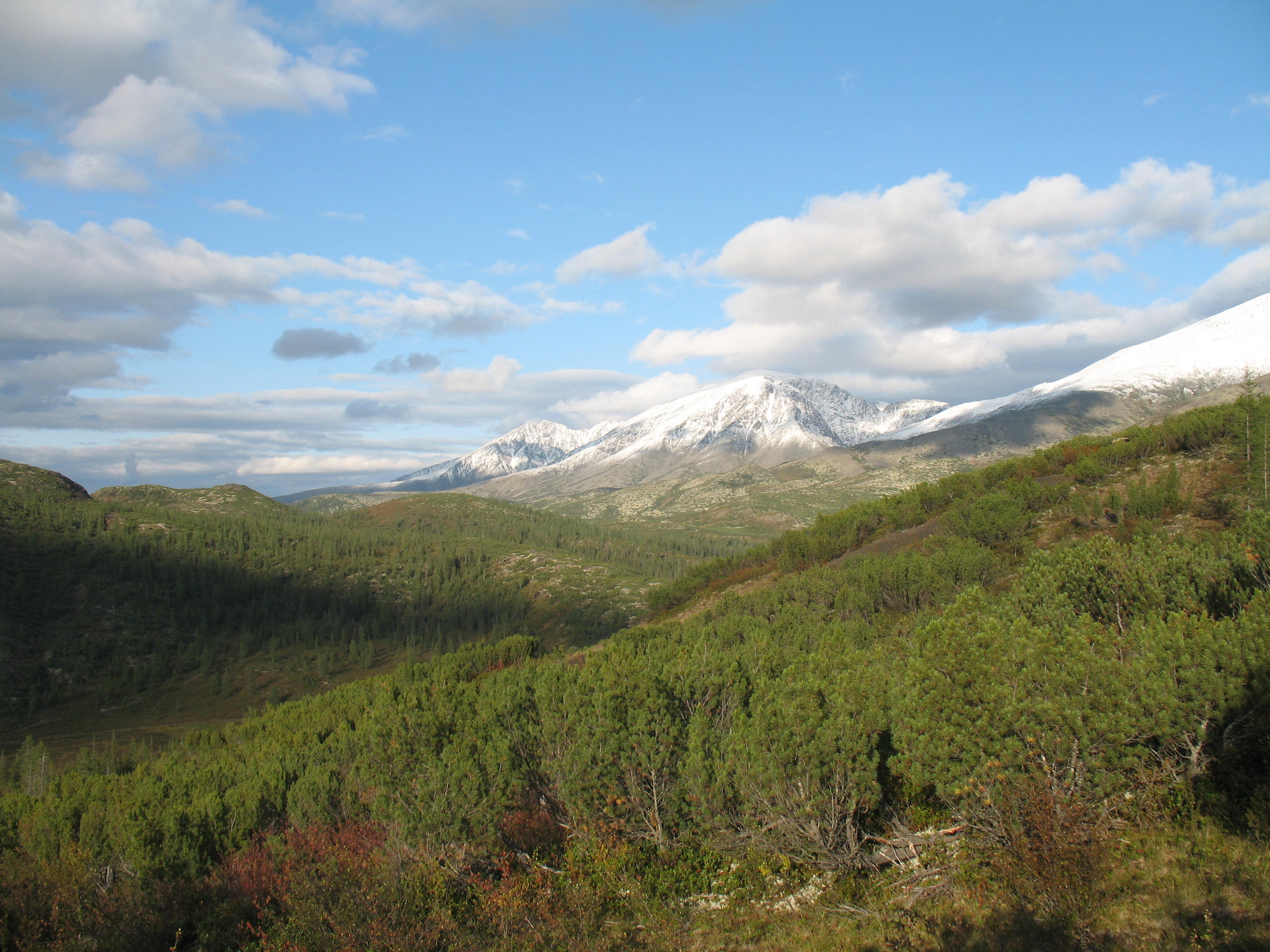 Вид на голец Иняптук в Северобайкальском районе Бурятии, Восточная Сибирь.